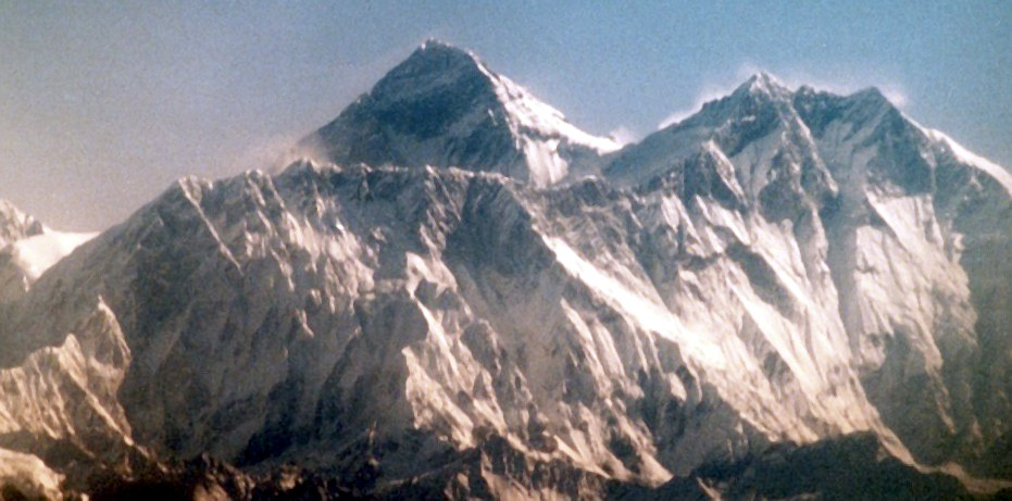 Everest von Süden (Nepal) mit Lhotse (rechts im Bild) und Nuptse-Wand (im Vordergrund) eigene Aufnahme vom Flugzeug aus, die ich hiermit der Allgemeinheit stifte --Uwe Gille 15:27, 20. Okt 2004 (CEST)